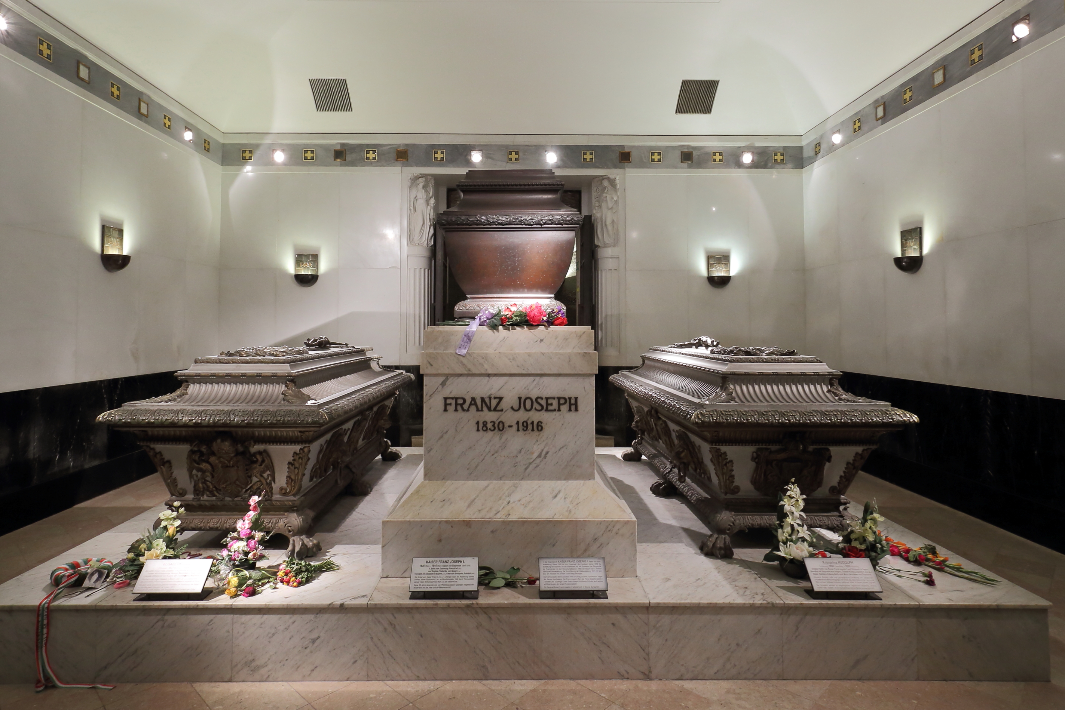 Die Franz-Joseph-Gruft in der Kapuzinergruft in Wien, Österreichs größte Gruft. Links der Sarg der Kaiserin Elisabeth (1837-1898), in der Mitte der von Franz Joseph I. (1830-1916), Kaiser von Österreich und rechts der seines Sohnes, Kronprinz Rudolph (1858-1889).